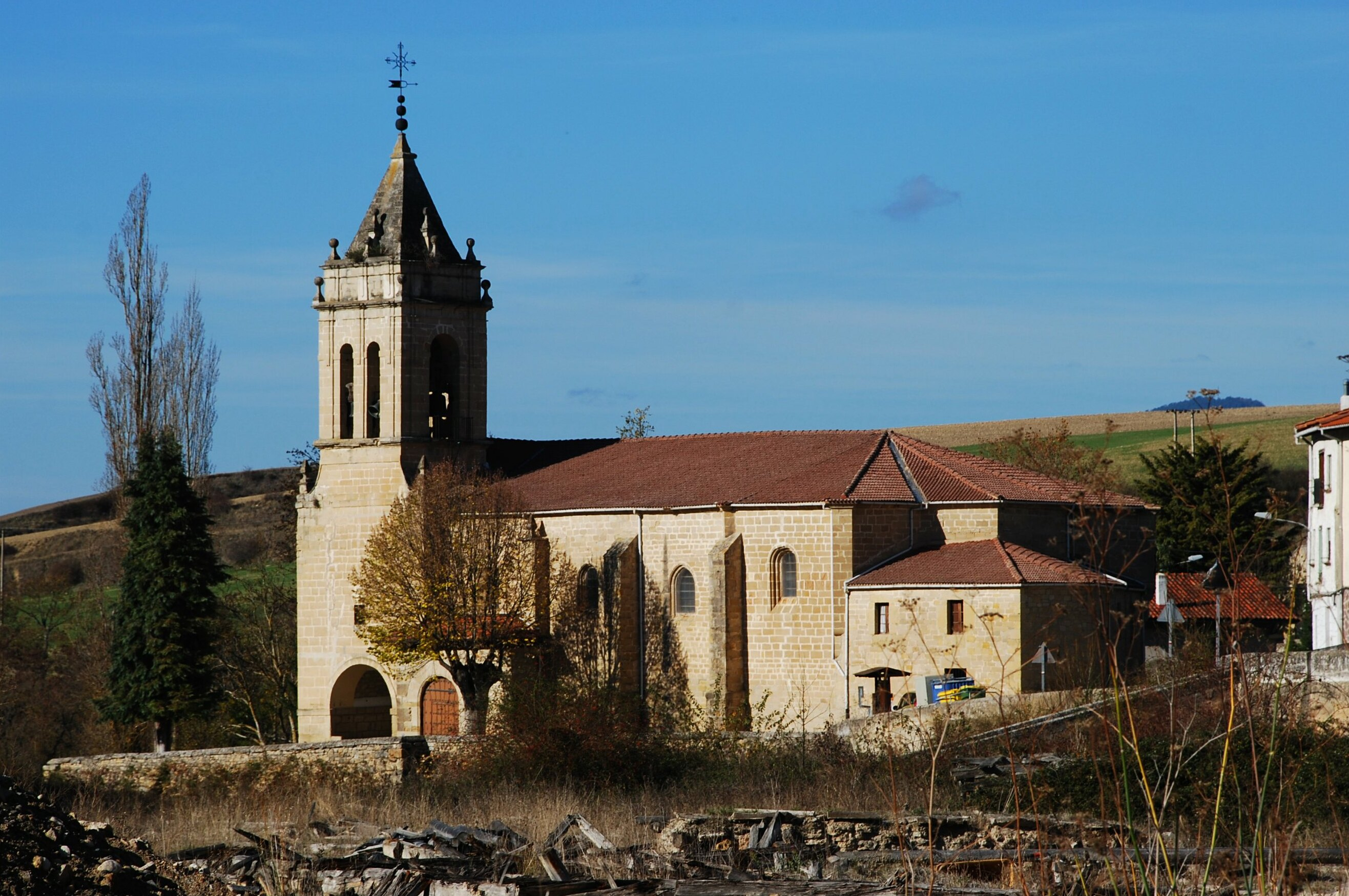 Iglesia de Santa María de Villacones en Añana, (Álava - País Vasco - España)